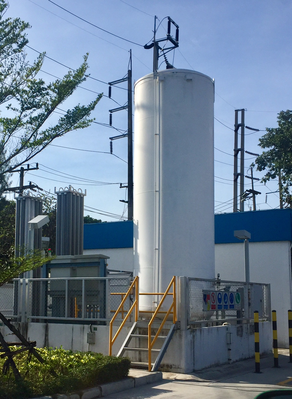 タイの天然ガスステーション